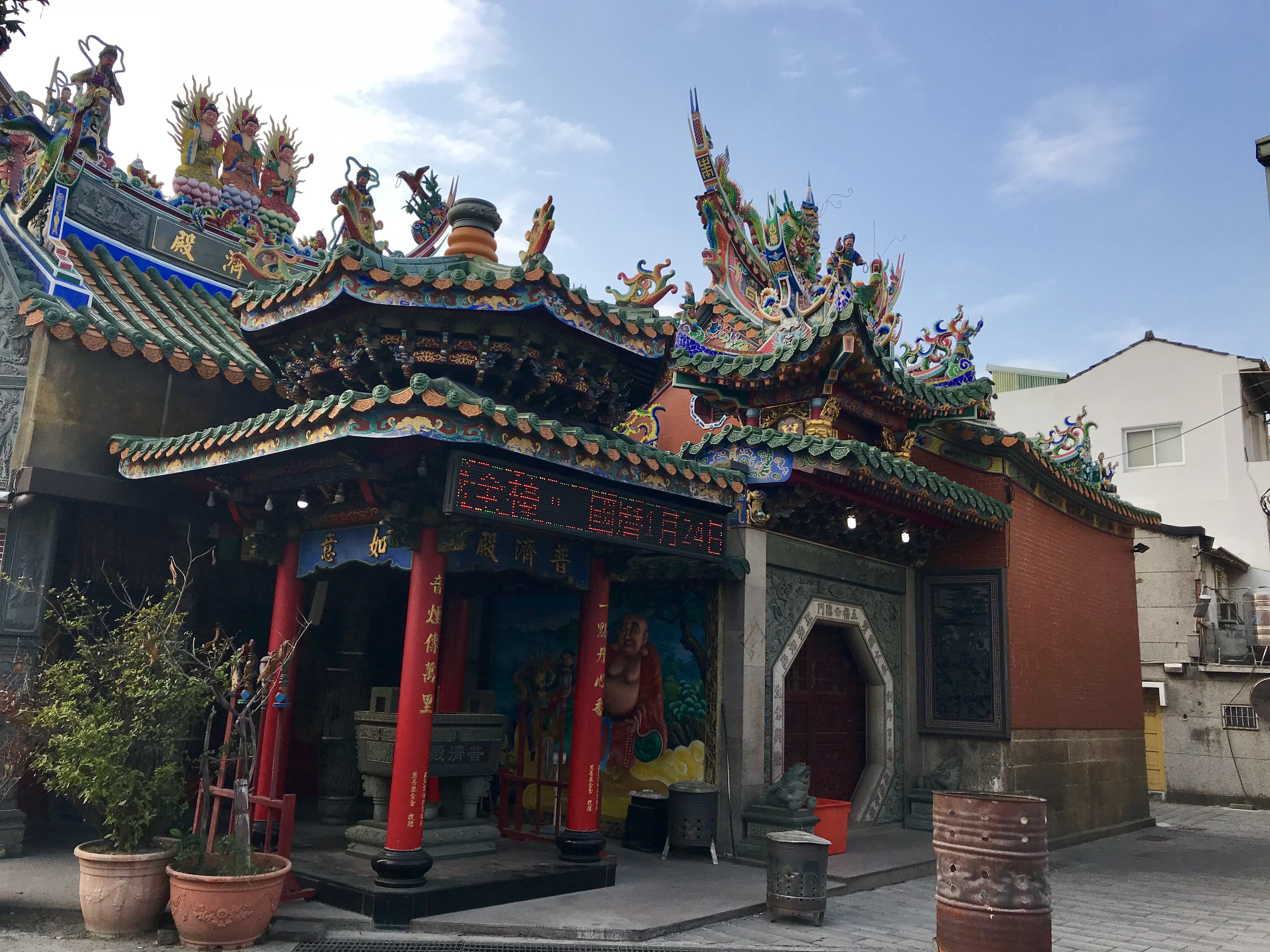 中文（台灣）: 普濟殿側殿一景